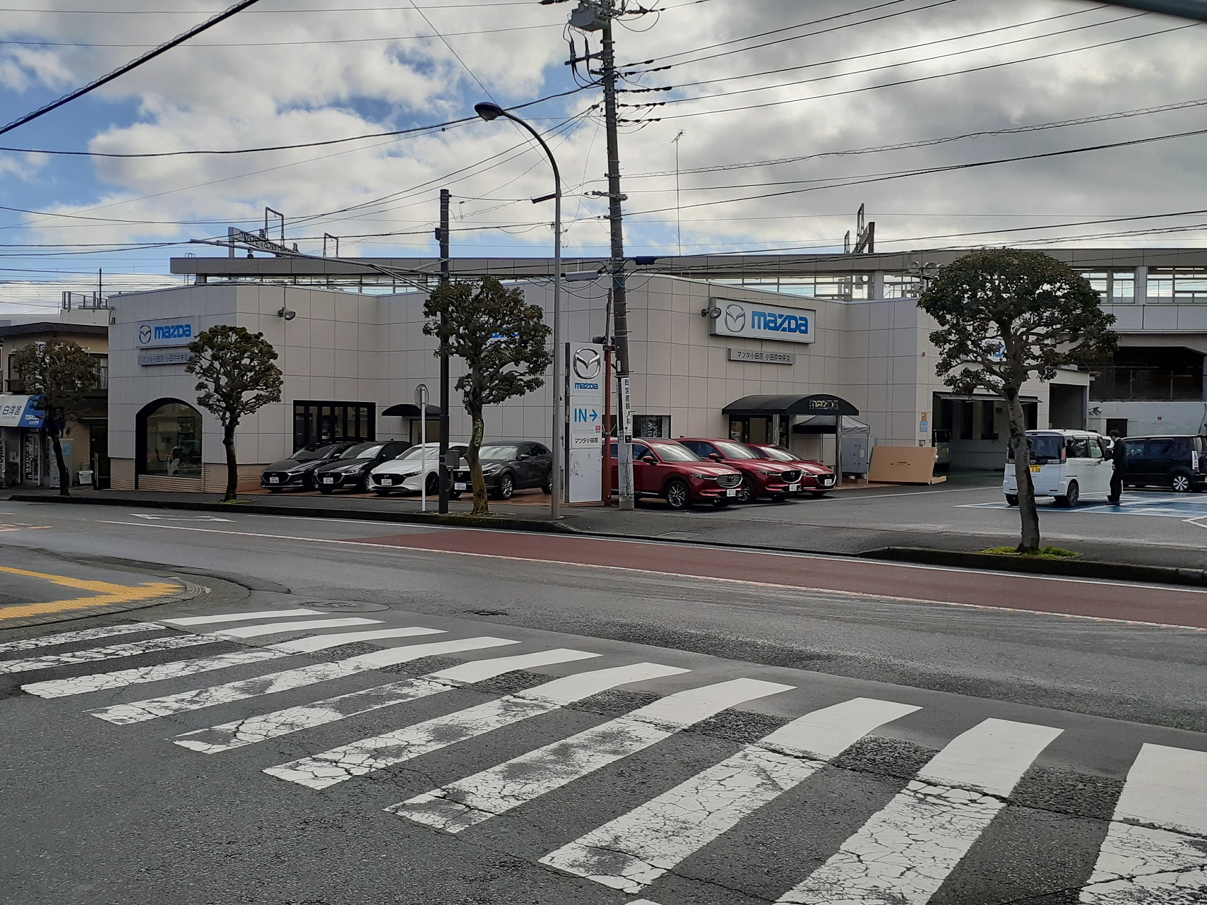 投稿者による撮影